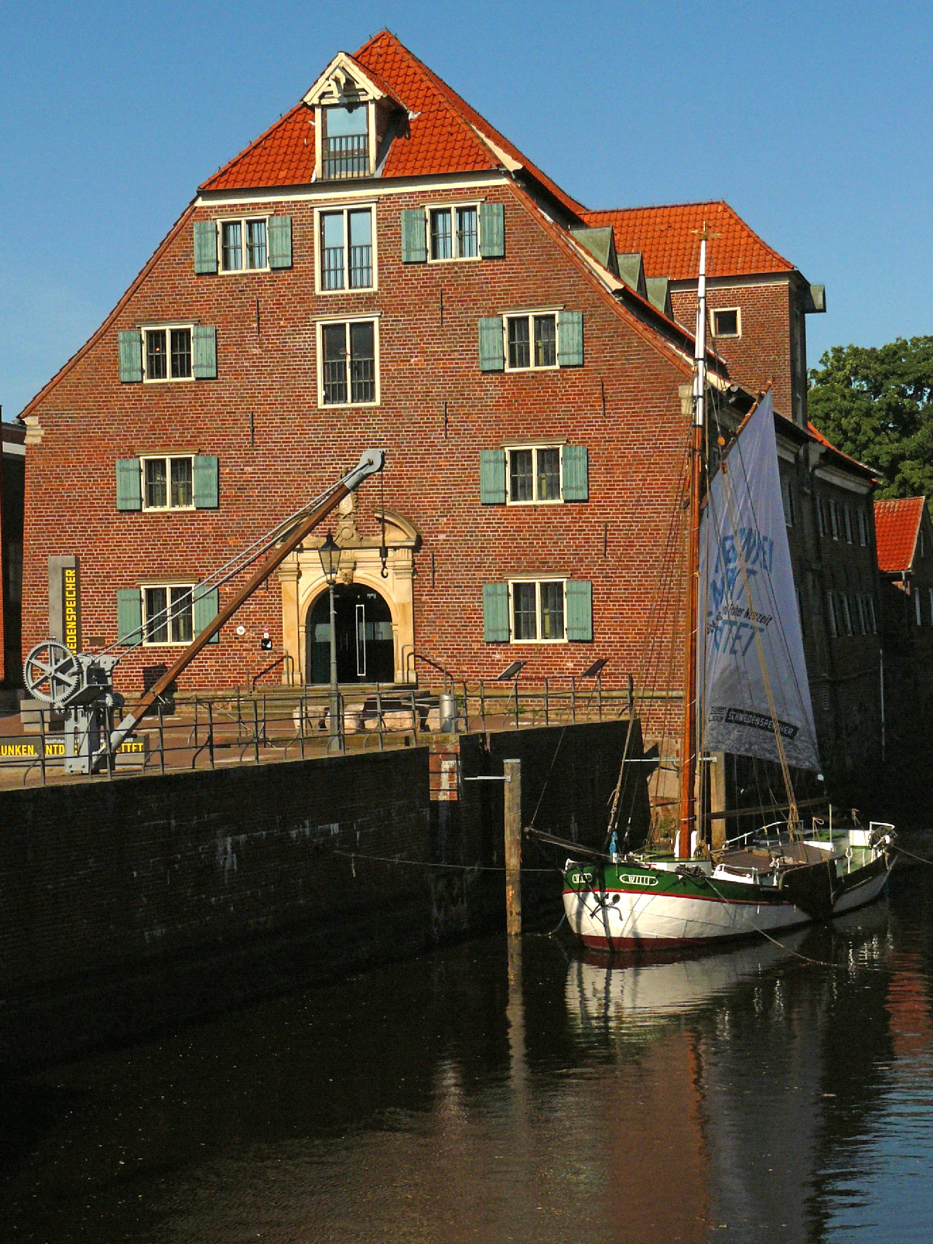 Westfassade des Schwedenspeichers Stade